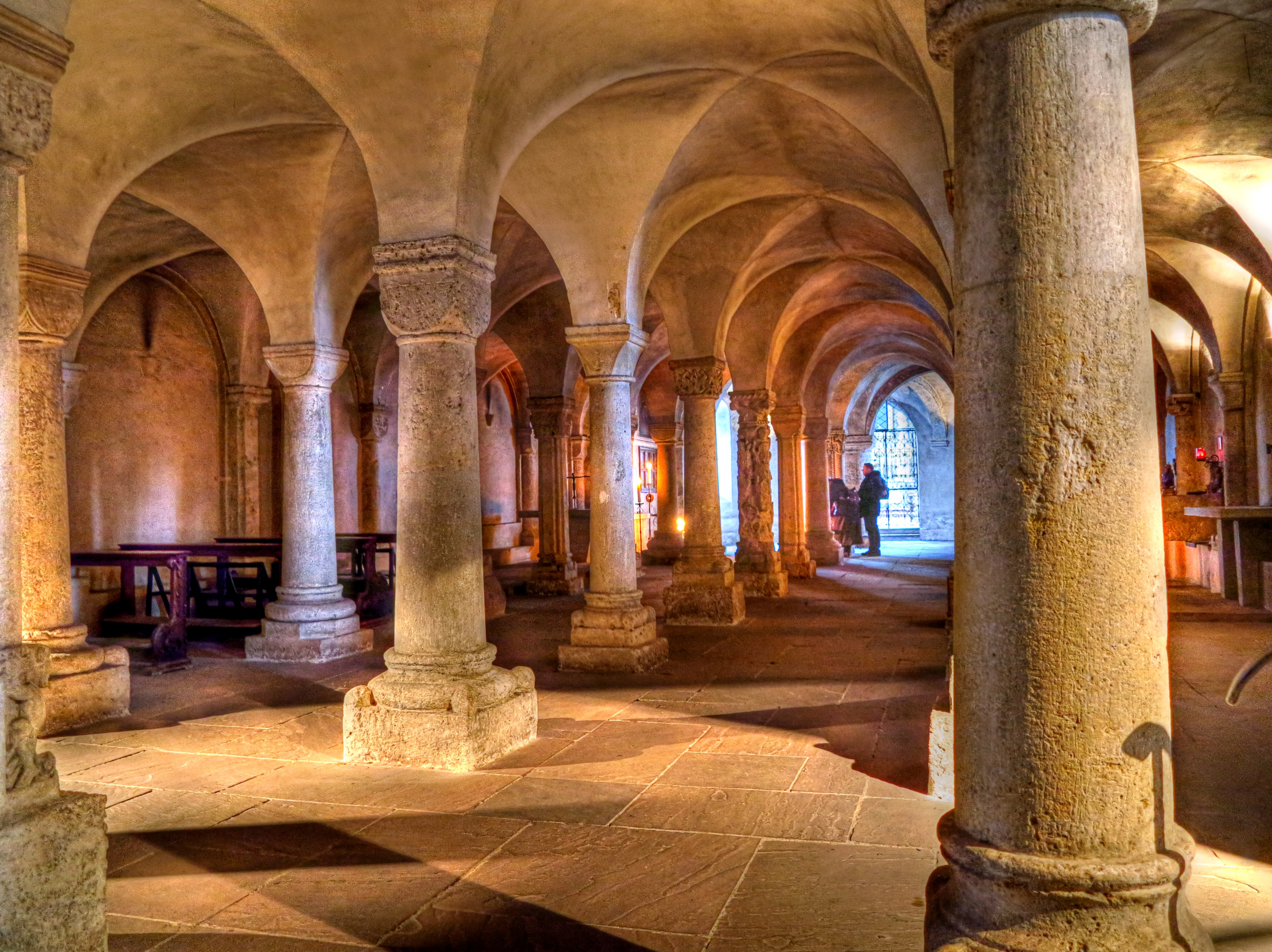 Deutschland, Bayern, Freising, Freisinger Dom, Säulen der Krypta